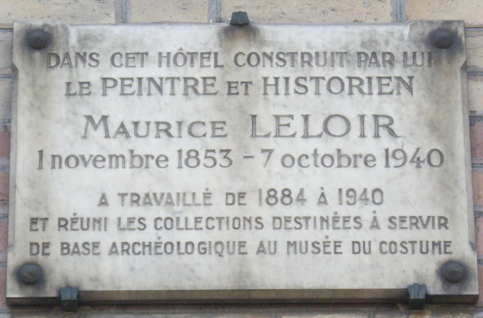 Plaque commémorative, 21 avenue Gourgaud, Paris 17e, apposée sur la façade donnant sur la place Paul-Léautaud.« Dans cet hôtel construit par lui, le peintre et historien Maurice Leloir, 1 novembre 1853 – 7 octobre 1940, a travaillé de 1884 à 1940 et réuni les collections destinées à servir de base archéologique au Musée du Costume. »